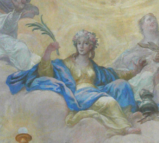 Bad Wurzach, Pfarrkirche St. Verena, Deckenfresko im Mittelschiff von Andreas Brugger Mittelteil, die Kirchenpatronin St. Verena